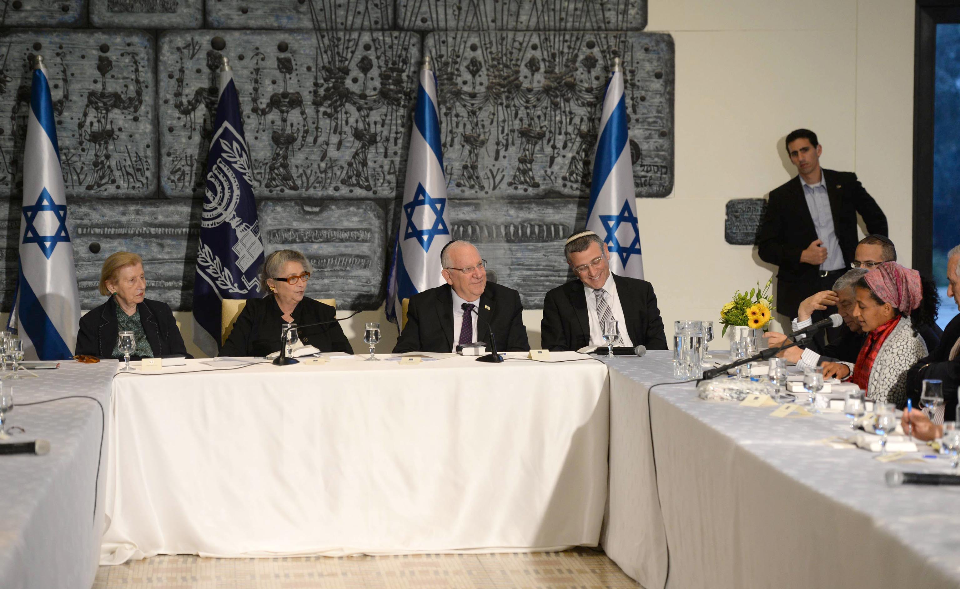 ראובן ריבלין נשיא מדינת ישראל ורעייתו מארחים את שיעור התנ"ך השלישי במיזם 929 - תנ"ך ביחד עם ראומה וייצמן משמאל